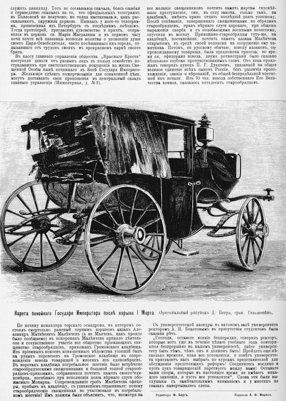 Журнал «Нива»